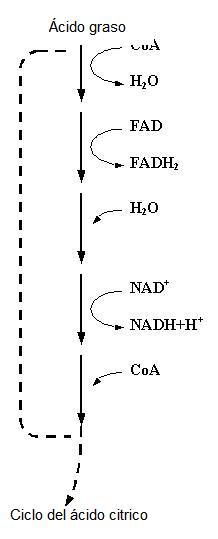 Cyklisk fettsyra nedbrytning i translated it to spanish.